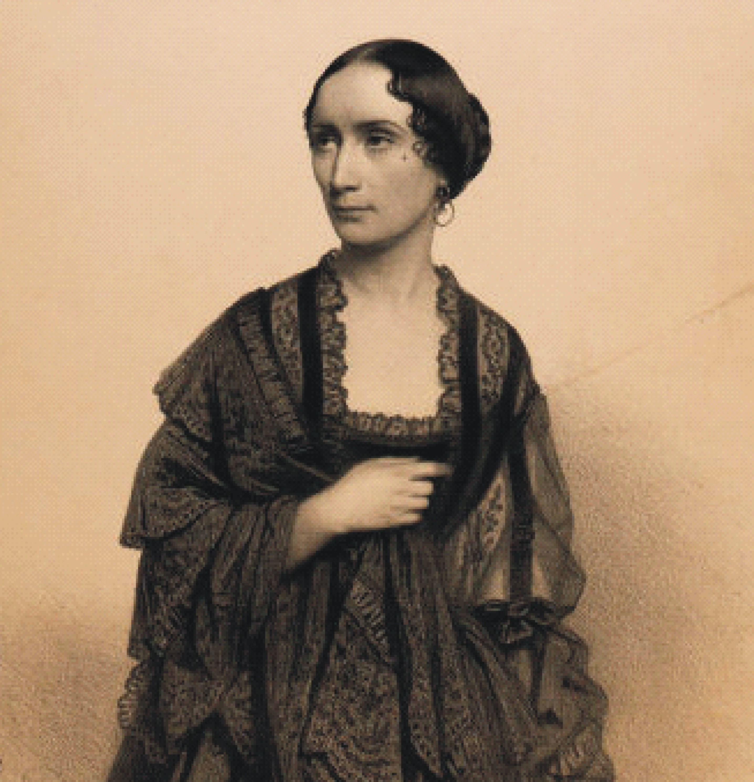 Opernsängerin Rosine Stoltz Quelle: Deckel eines Programmheftes um 1850 Fotograf/Zeichner: unbekannt Datum: gescannt 28.06.2006